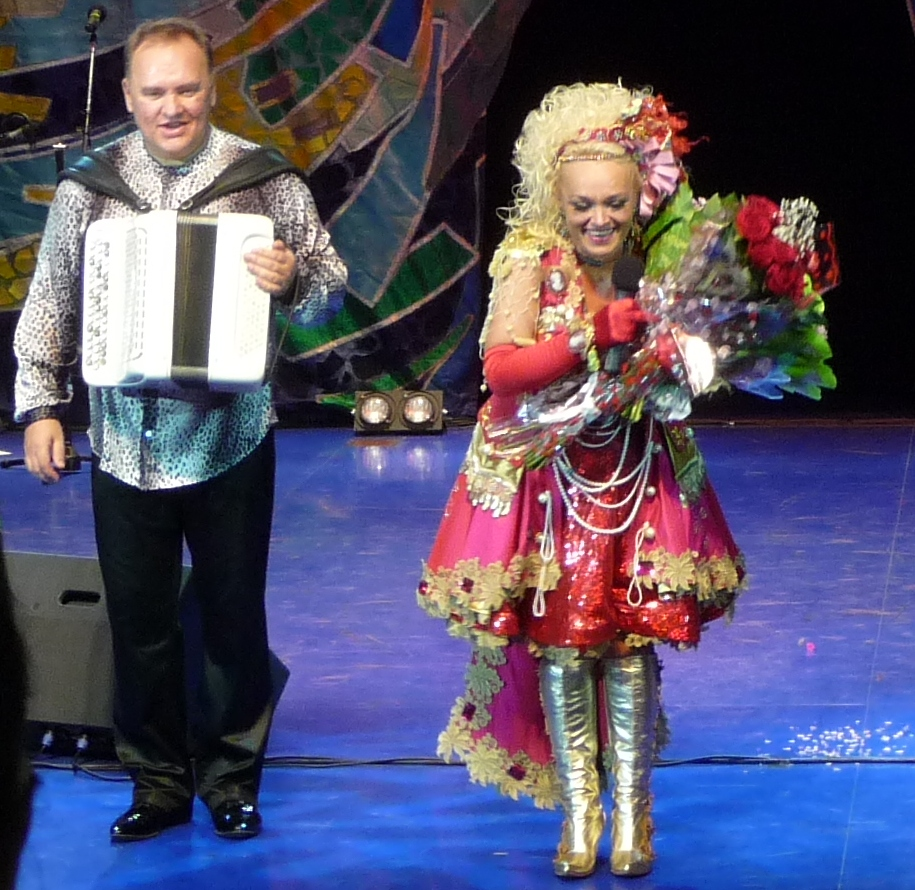 Nadieshda-p1040223.jpg